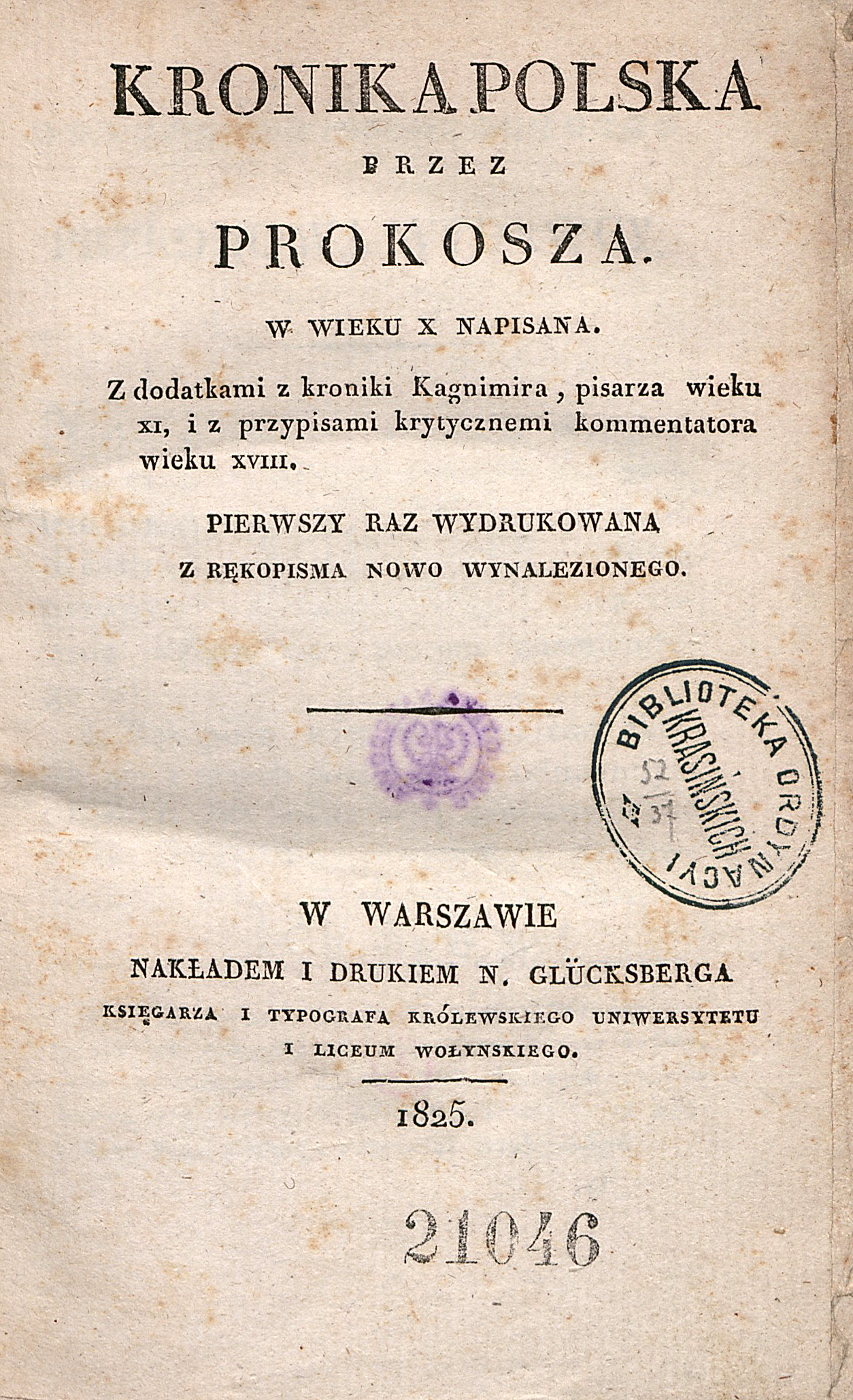 Kronika polska przez Prokosza w wieku X napisana, z dodatkami z Kroniki Kagnimira, pisarza wieku XI, i z przypisami krytycznymi komentatora wieku XVIII pierwszy raz wydrukowana z rękopisma nowo wynalezionego – strona tytułowa